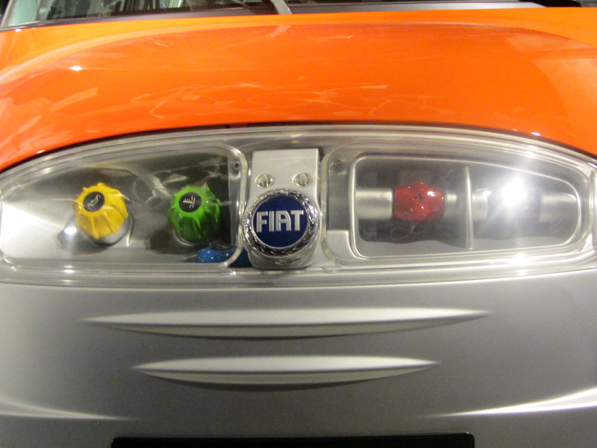 Museo Nazionale dell'Automobile di torino, concept eco friendly area. Modelli Fiat e Phoenix. nella foto Fiat Ecobasic, Italia 2000, motore 4 cilindri a iniezione diretta common rail. Cilindrata 1200cc 61CV a 3500giri. Vel Max: 160km/h alimentazione: Turbo Diesel